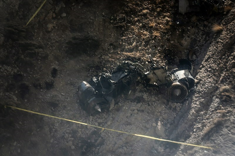 عملیات جستجو در محل سقوط هواپیمای CL۶۰ ترکیه